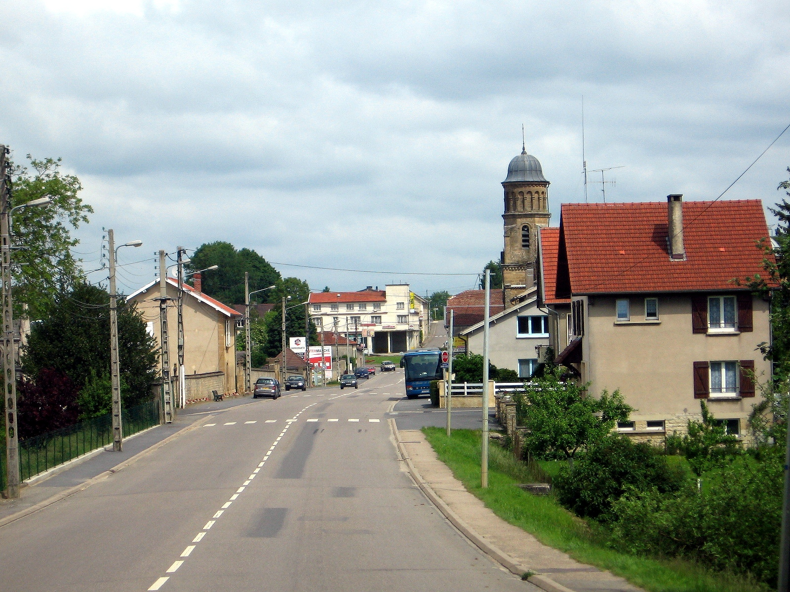 Stenay